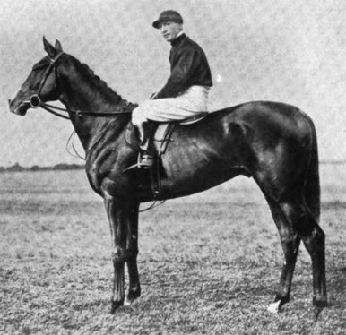 1921 Epsom derby winner Humorist.